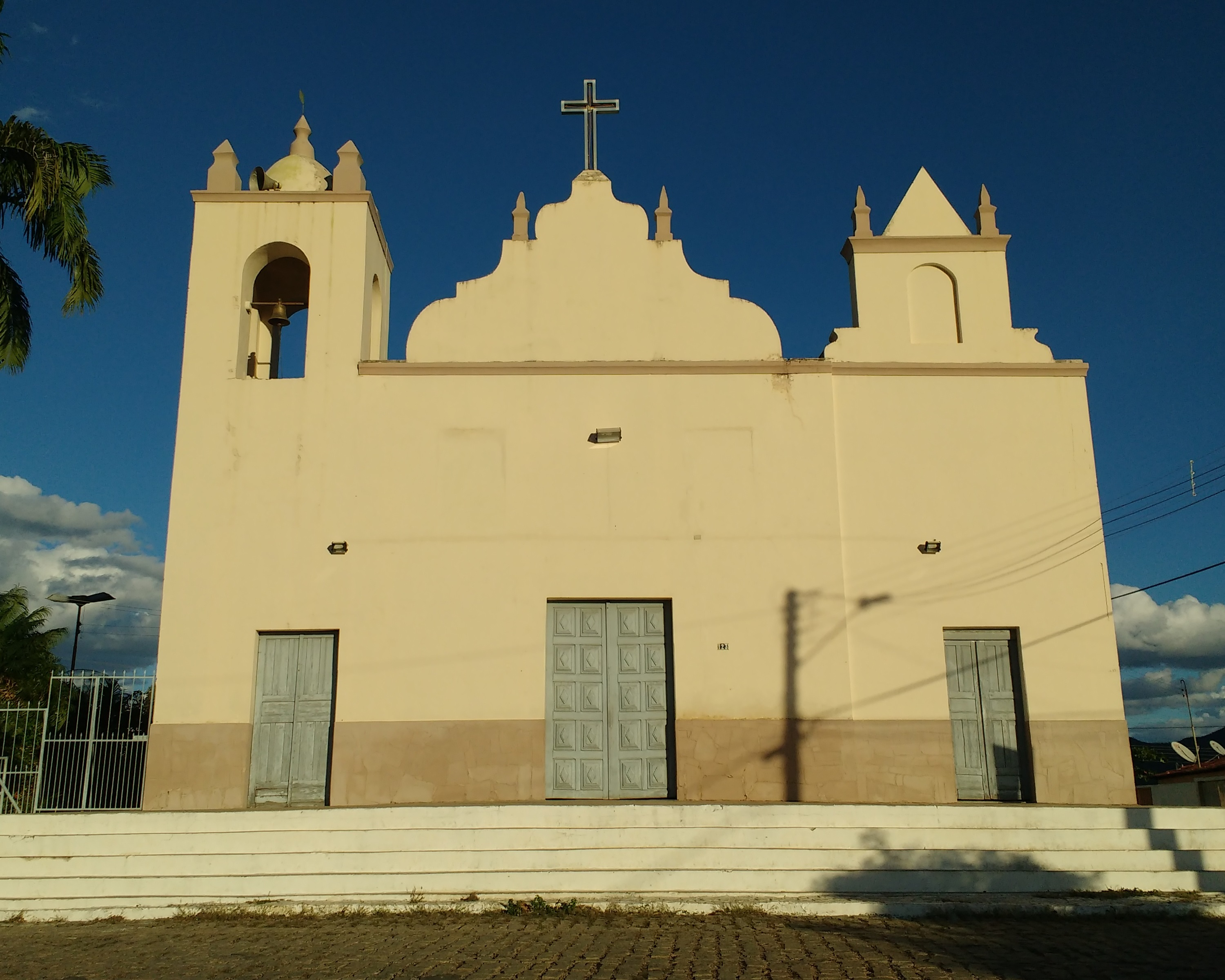 Igreja Matriz do Bom Jesus da Agonia, da diocese de Limoeiro do Norte, em Ereré, Ceará (Brasil)